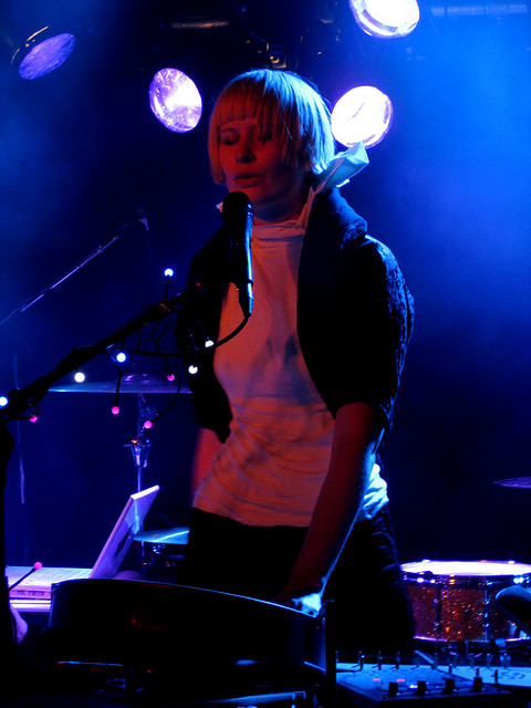 Выступление Rockettothesky на фестивале Øya Festival в 2008 году.